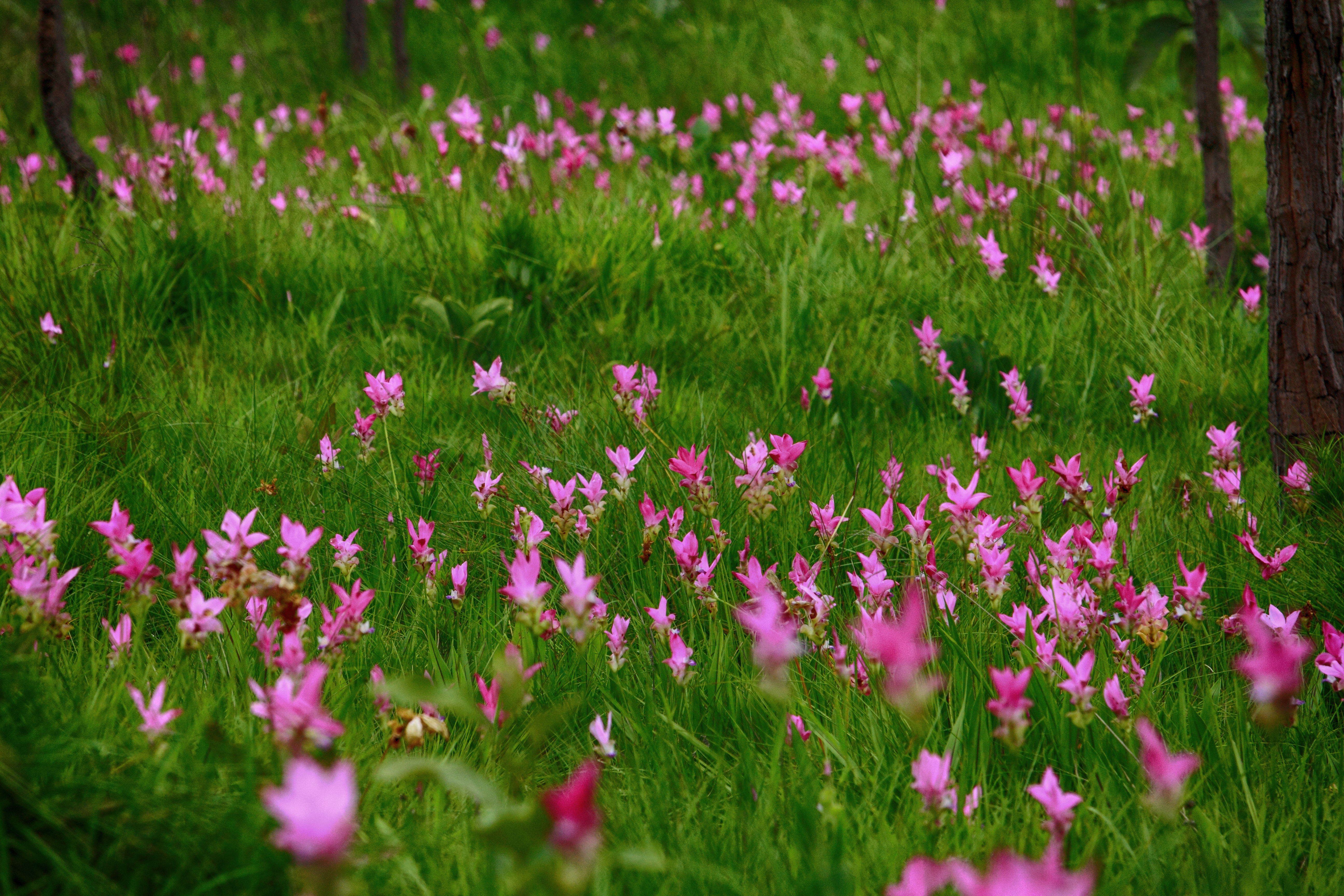 อุทยานแห่งชาติป่าหินงาม ตั้งอยู่ในท้องที่ของอำเภอเทพสถิต จังหวัดชัยภูมิ เป็นอุทยานแห่งชาติลำดับที่ 105 ของประเทศไทย ได้รับการจัดตั้งเป็นอุทยานแห่งชาติเมื่อวันที่ 6 มิถุนายน 2550 ในปี 2528 ได้มีการสำรวจพื้นที่บริเวณป่าหินงาม พบว่ามีความสวยงาม เหมาะจะเปิดเป็นอุทยานเพื่อการพักผ่อนหย่อนใจของประชาชนทั่วไป ทางการจึงเสนอเรื่องไปยังกรมป่าไม้ผ่านทางจังหวัดชัยภูมิ ได้จัดตั้งเป็น วนอุทยานป่าหินงาม ในปี 2528 นั้นเอง ต่อมาได้ทำการสำรวจพื้นที่โดยละเอียดยิ่งขื้น และได้ผนวกเอาพื้นที่ผืนป่าตามแนวสันเขาพังเหยซึ่งเป็นป่าต้นน้ำของลำคันฉูซึ่งไหลลงแม่น้ำชี นอกจากนี้ พื้นที่บริเวณนี้มีความงามของธรรมชาติอย่างสมบูรณ์ จึงได้จัดตั้งเป็นอุทยานแห่งชาติเมื่อปี 2550 ในชื่ออุทยานแห่งชาติป่าหินงาม อุทยานแห่งชาติป่าหินงาม เป็นที่รู้จักดีในหมู่นักท่องเที่ยวว่าเป็นทุ่งดอกปทุมมาที่ใหญ่และสวยงามมากแห่งหนึ่ง โดยทุ่งดอกปทุมมาอีกแห่งหนึ่งที่ได้รับความนิยมไม่แพ้กันคือที่อุทยานแห่งชาติไทรทอง นอกจากนี้ ยังมีลานหินงาม ซึ่งมีหินรูปร่างแปลกตามากมาย เกิดจากการกัดเซาะของหินทรายเป็นเวลานับพันปี